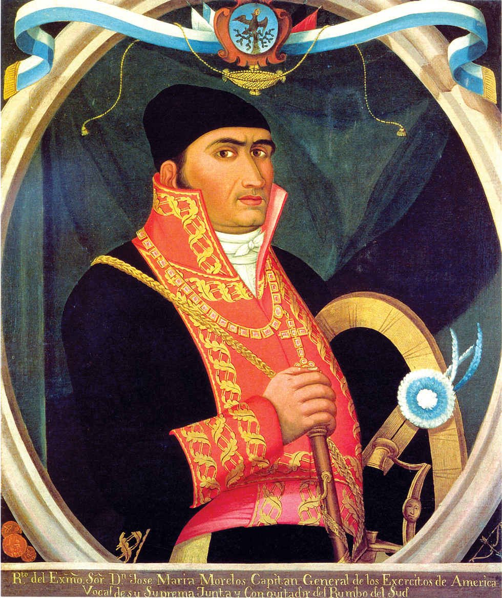 En 1812, un pintor mixteco del que se desconoce la identidad realizó este Retrato del excelentísimo señor don José María Morelos. Capitán de los ejércitos de América. Vocal de su suprema junta y conquistador del rumbo sur. Hoy se encuentra en el Museo Nacional de Historia (Castillo de Chapultepec).